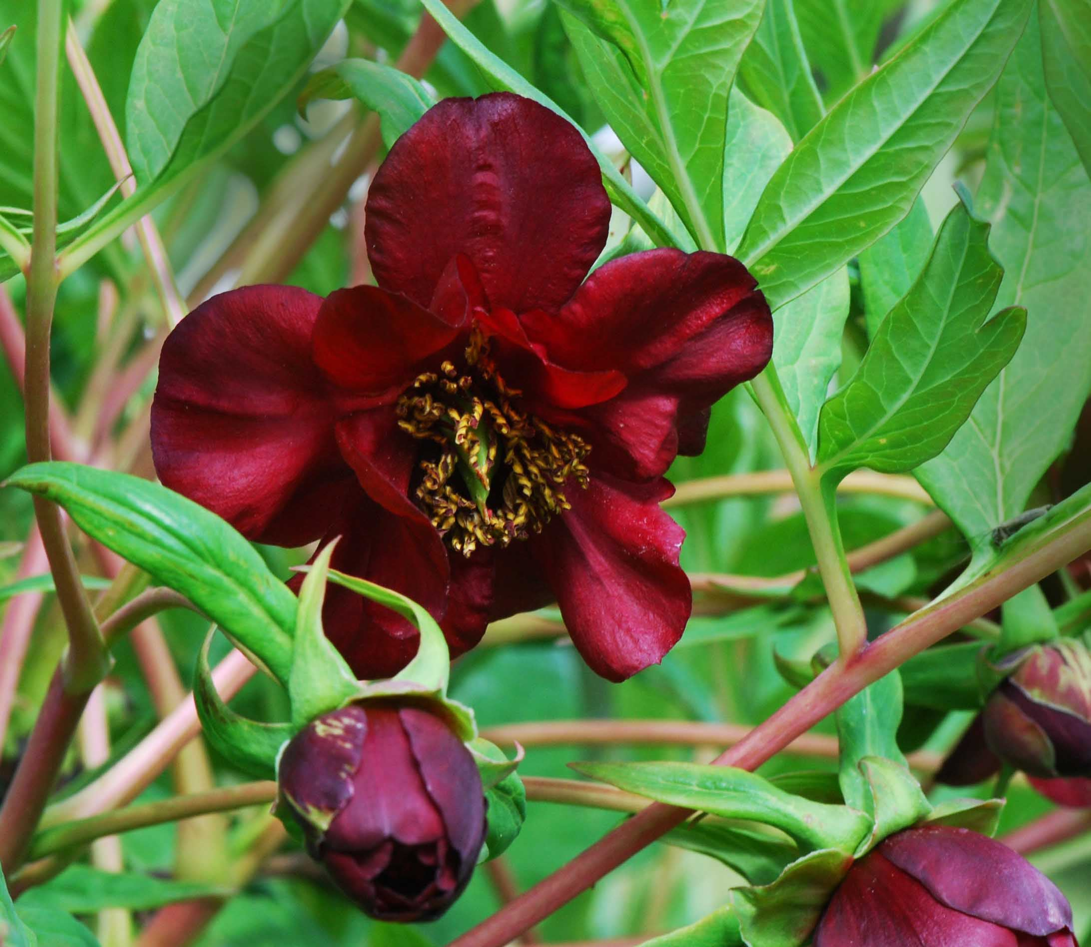 Paeonia delavayi, fleur, Jardin des Plantes de Paris